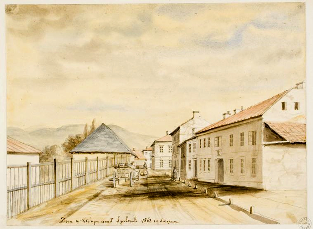 Беларуская (тарашкевіца): Вільня (Vilnia), вуліца Каралеўская (vulica Karaleŭskaja). Дом Людвіка Кандратовіча (Уладзіслава Сыракомлі)